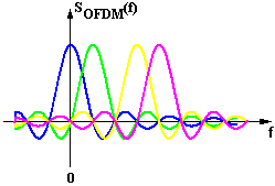 OFDM-Signal im Frequenzbereich Stefan Henze - GNU Free Documentation License: Vorlage:Bild-GFDL